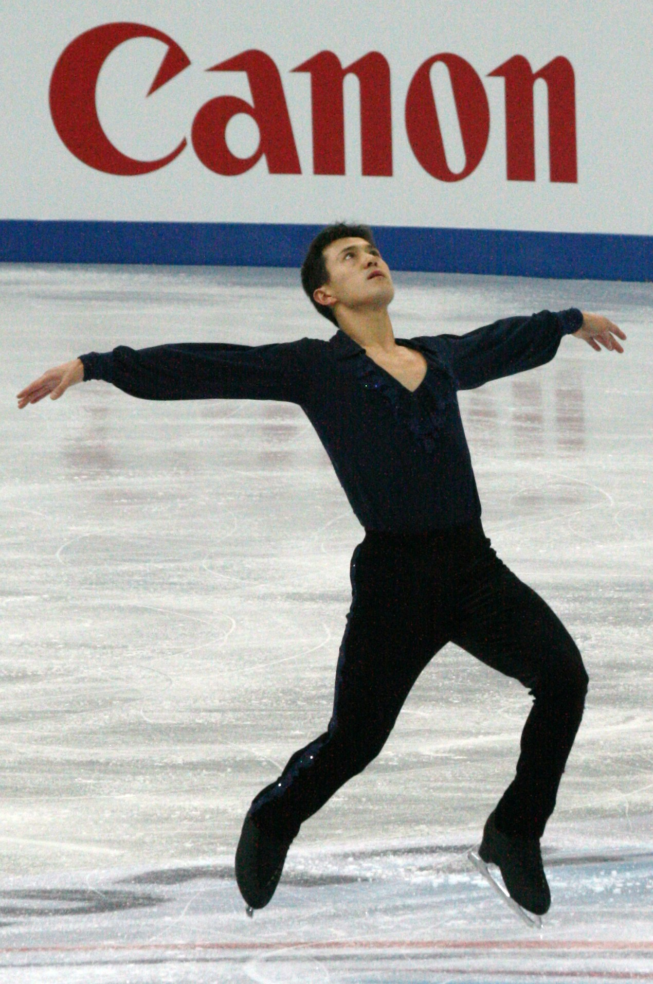 Патрик Чан (Канада) на финале Гран-при 2012-2013. Короткая программа.